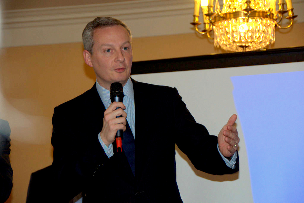 Bruno Le Maire, député UMP présente le sujet qu'il lance sur concernant la rénovation de la vie démocratique.